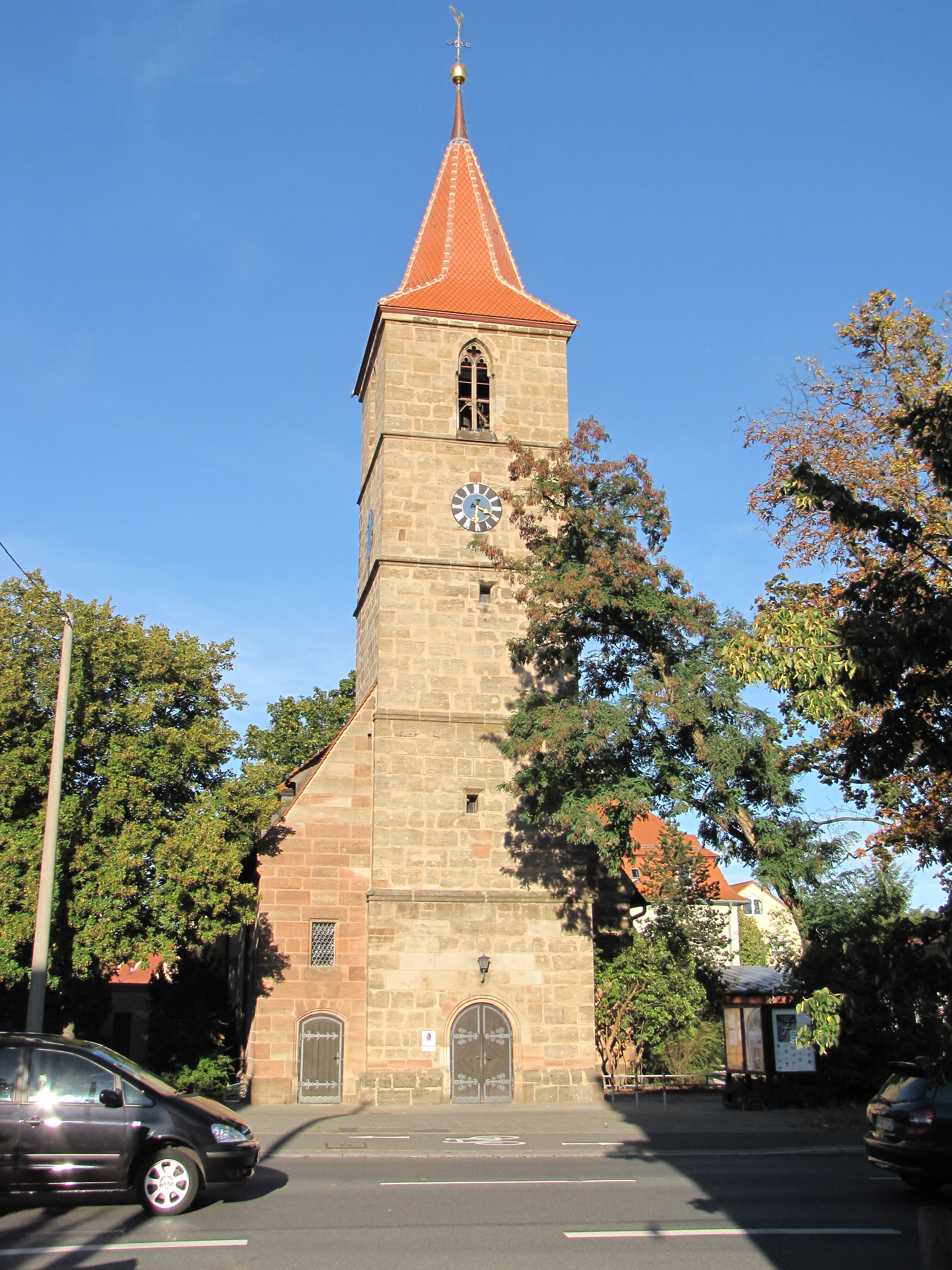 St. Johannes Baptist Kirche im Ortsteil Eibach der Stadt Nürnberg